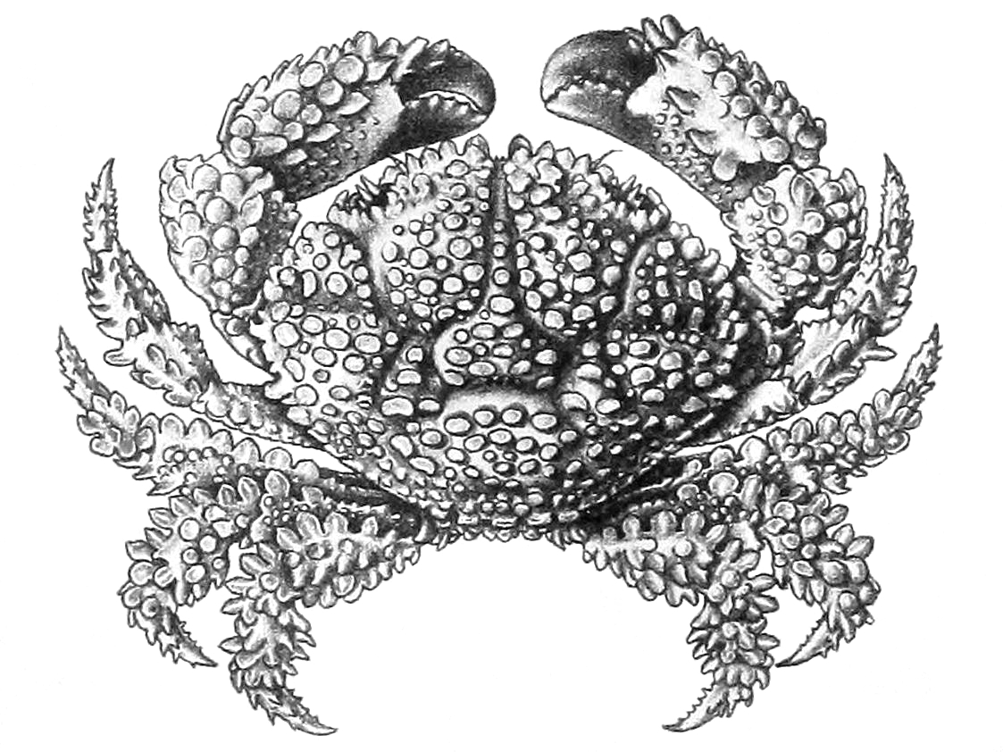 Ilustración de Actaea flosculata, por Alfred W. Alcock